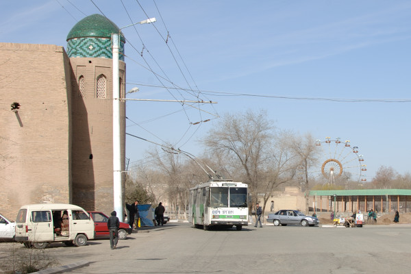 Škoda 14Tr 004 in Xiva